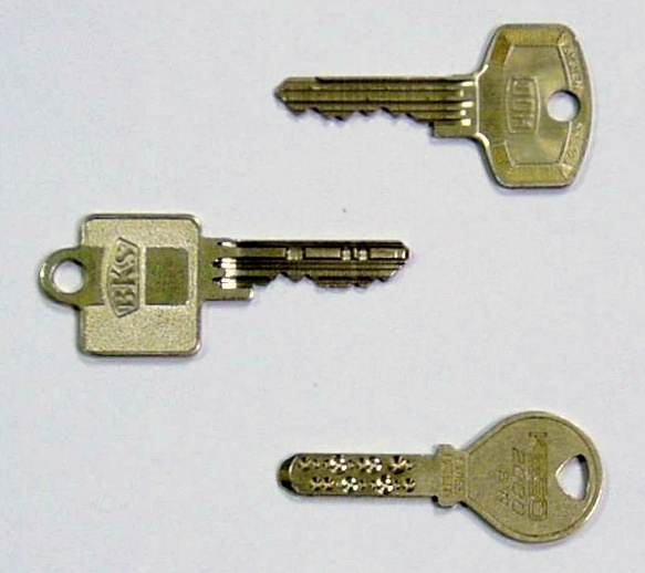 Schlüssel (verschiedene Sicherheitsstufen), (Keys) Germany.